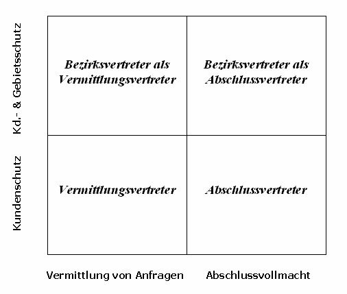 HGB Vertretungsregelungen für Deutschland in einer Matrix-Übersicht